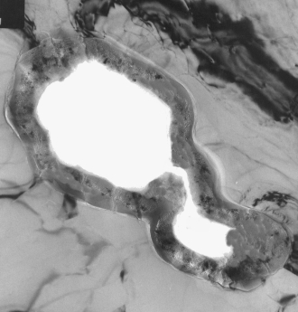 Pore in an etched aluminum anode foil for an aluminum electrolytic capacitor